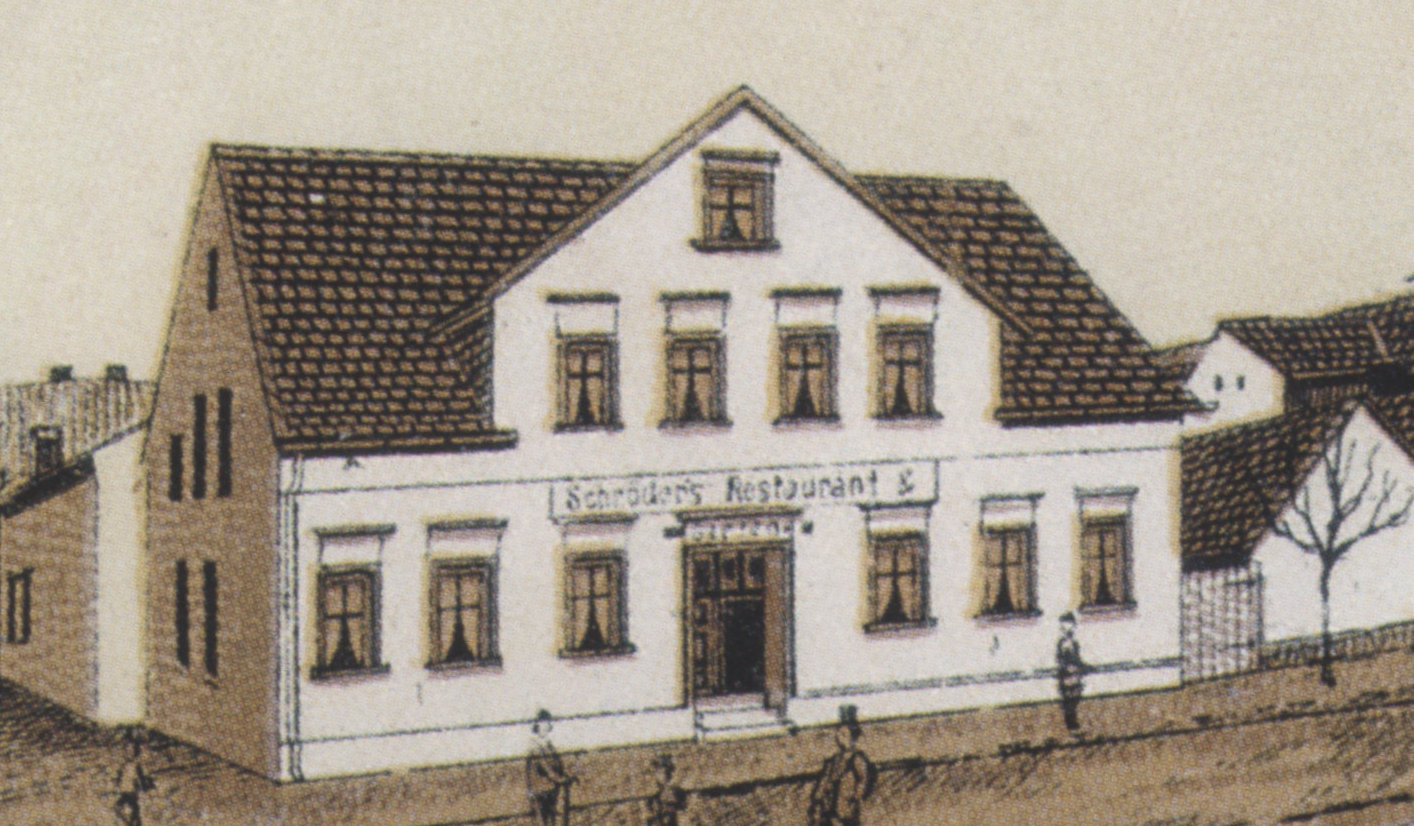 Schröder´s Restaurant und Garten auf Postkarte von 1903, damals Schönebecker Straße 38, heute (Stand 2013), Alt Fermersleben 37 Ecke Mertensstraße, Sitz von MBL Metallbau Lösecke